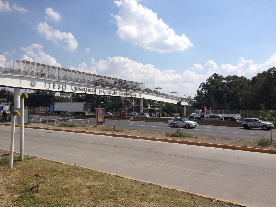 Puente que cruza todo periferico, hasta la entrada principal del ITESO